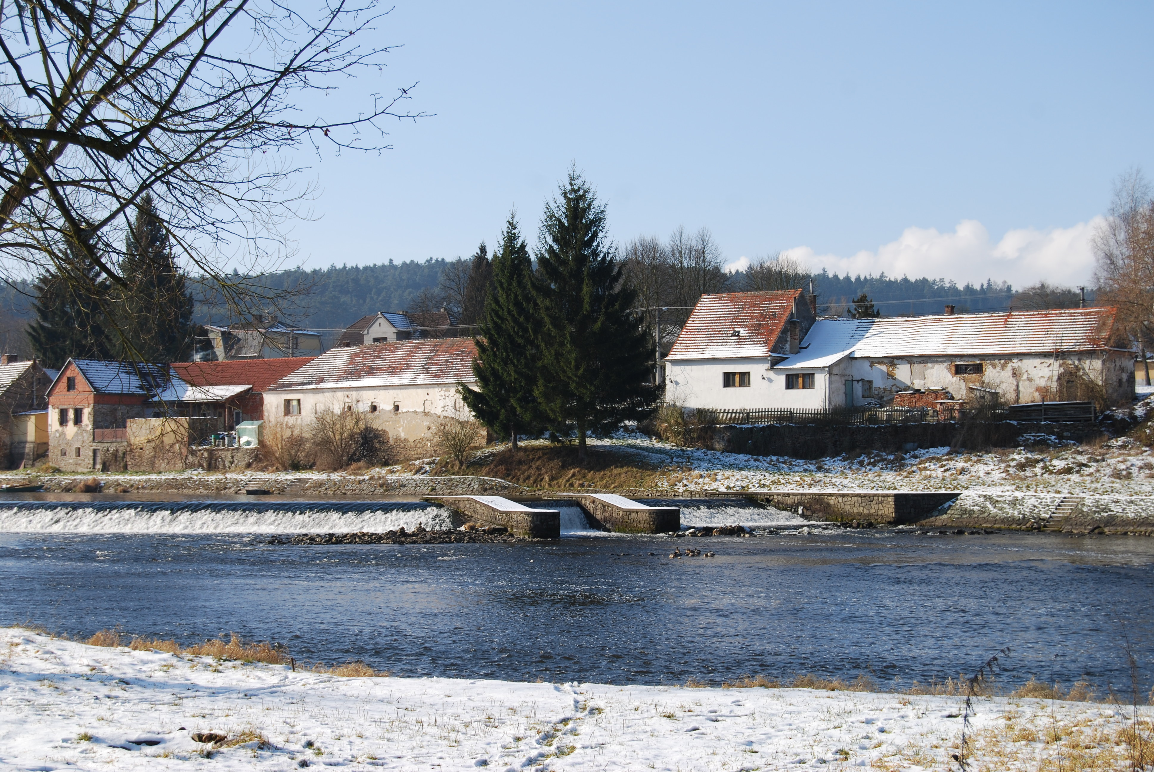 Hněvkovice na levém břehu Vltavy je vesnice, část města Týn nad Vltavou v okrese České Budějovice. Česká republika. - Google Maps - Google Earth